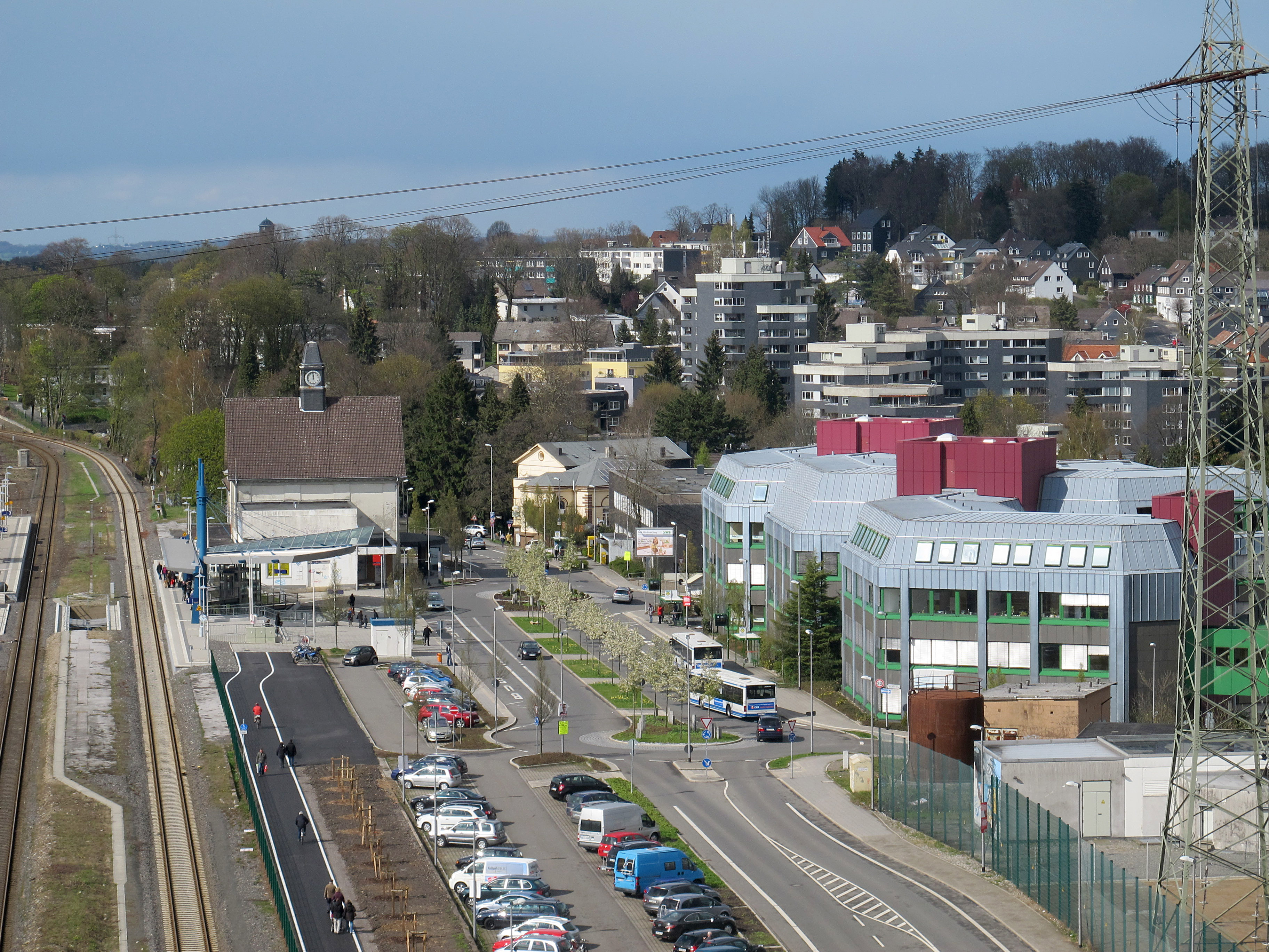 Lennep, Blick auf Bahnhof und Knusthöhe; rechts Freileitungsmast (110 kV) am UW Lennep